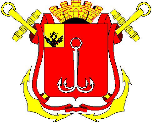 Проект герба Одеси